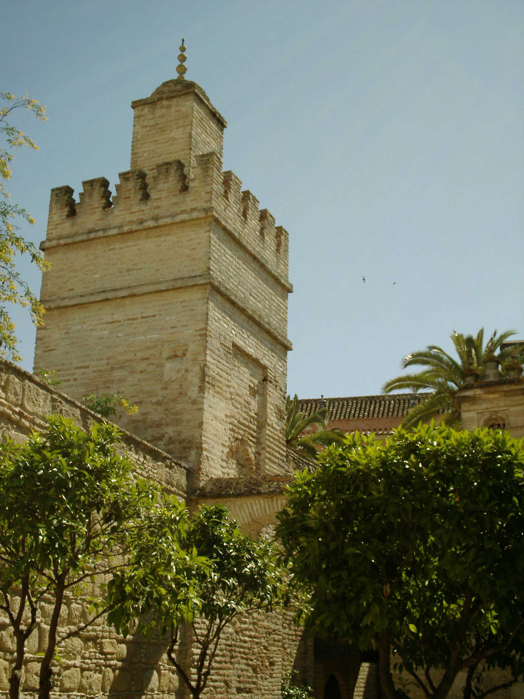 Alminar de la mezquita del alcázar de Jerez de la Frontera (Cádiz - España) Minaret de la mosquée de l'alcázar de Jerez de Frontera (Cadix - Espagne)